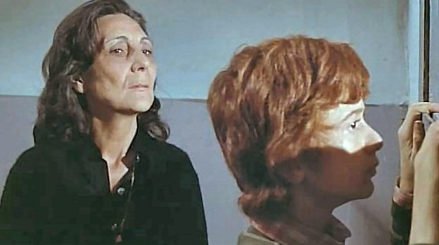 Screenshot dal film Furto di sera bel colpo si spera (1974)